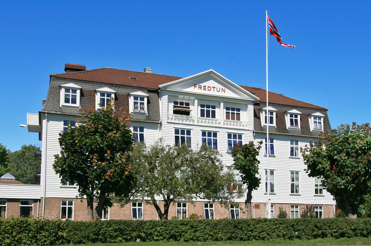 Fredtun folkehøgskole, Stavern, Larvik, Norway